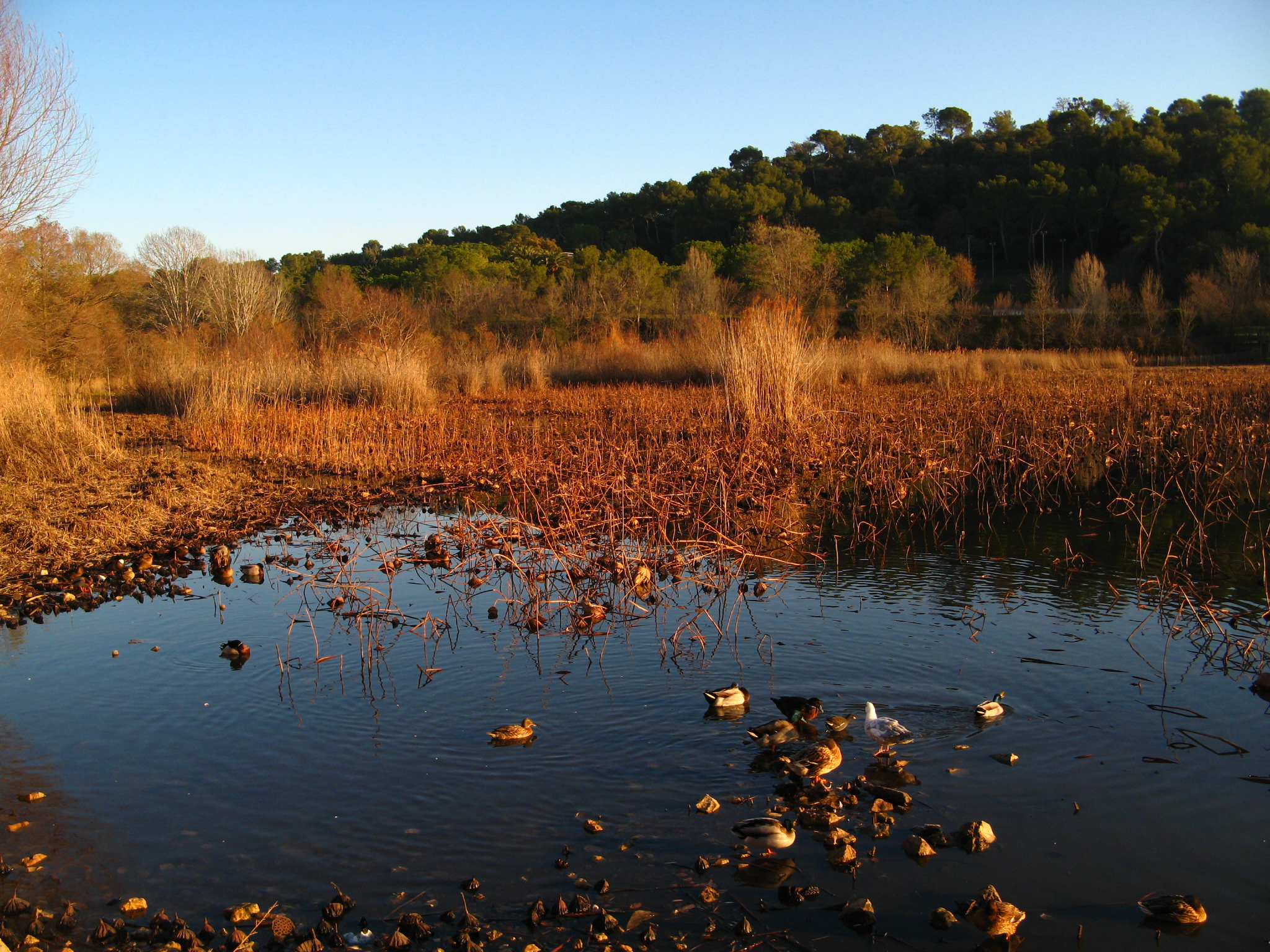 L'étang de Fontmerle, à Mougins (Alpes-Maritimes, France)